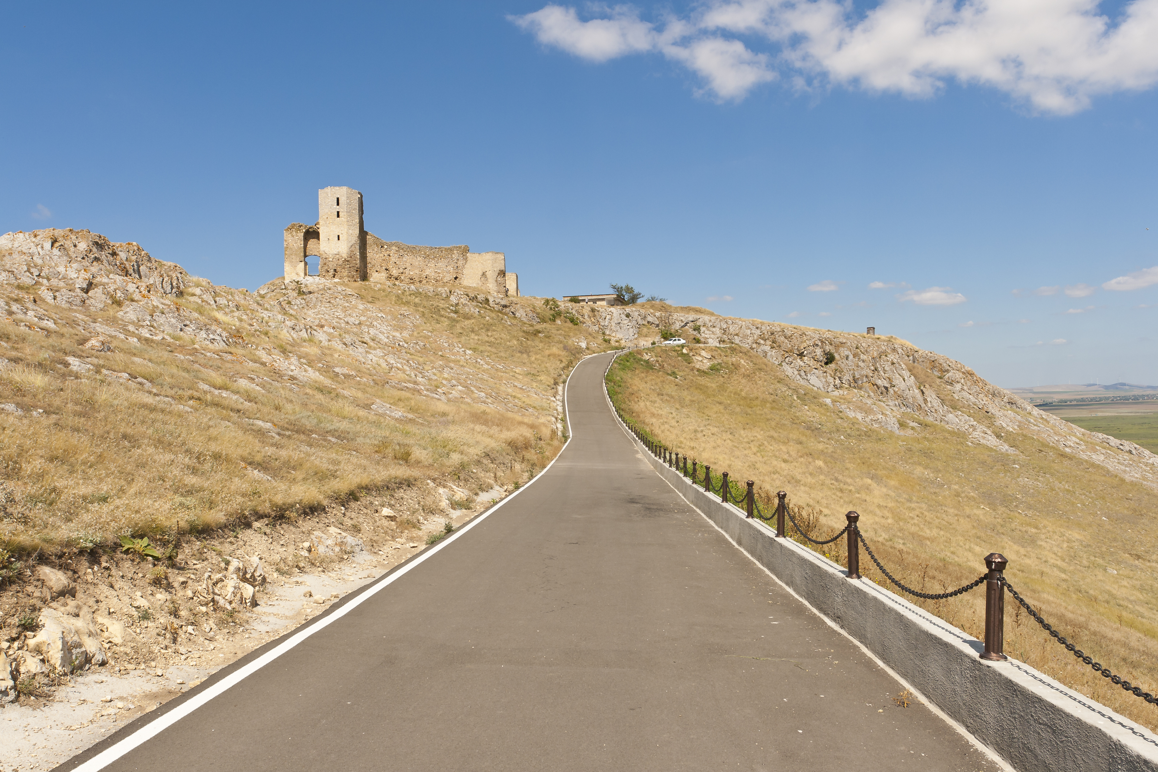 Cetatea Enisala